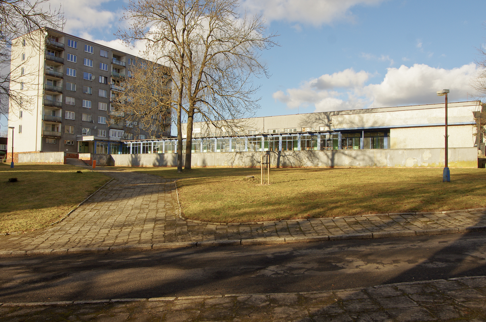 Obec Rovná, okres Sokolov